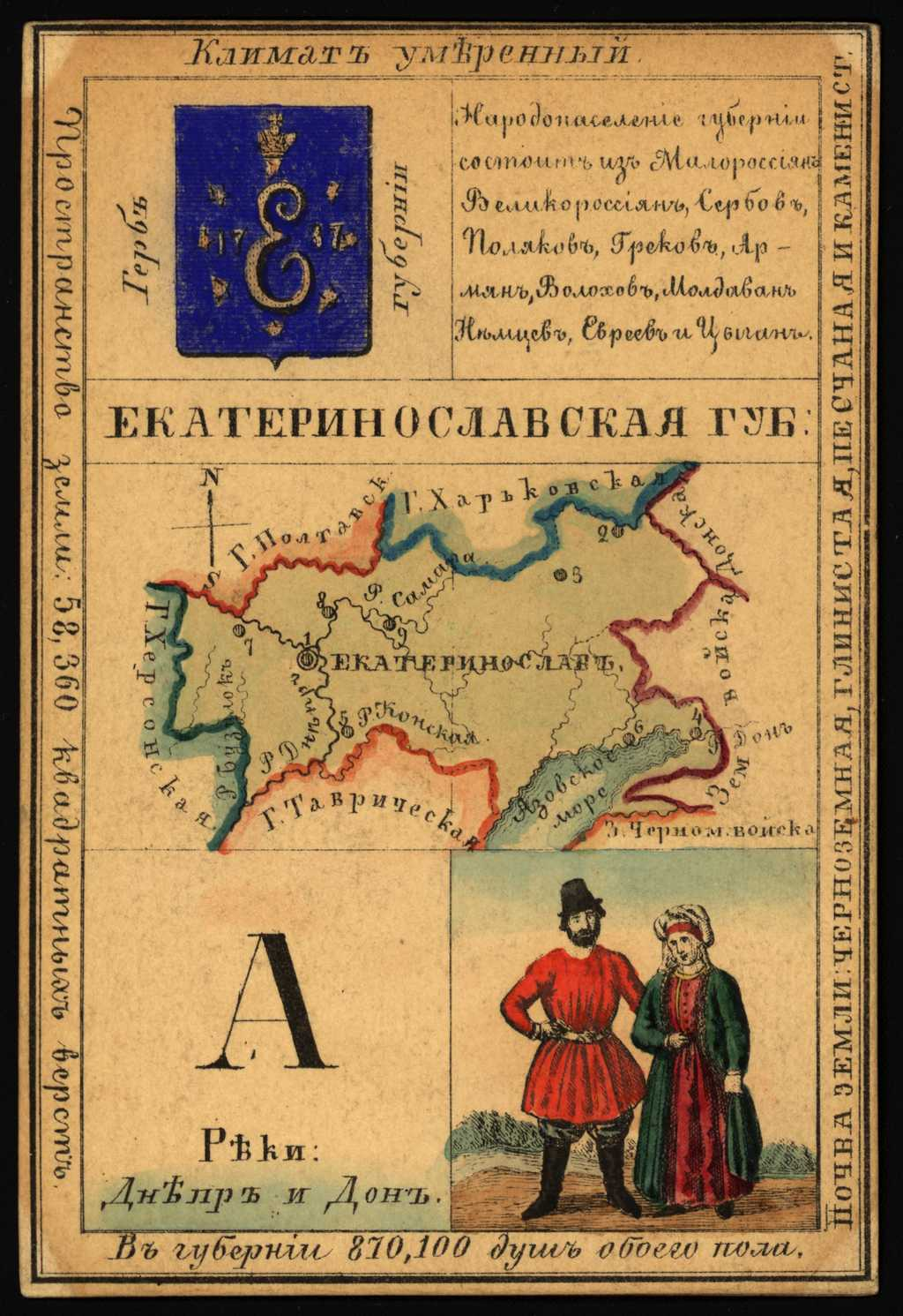 Екатеринославская губерния. Открытка из сувенирного набора